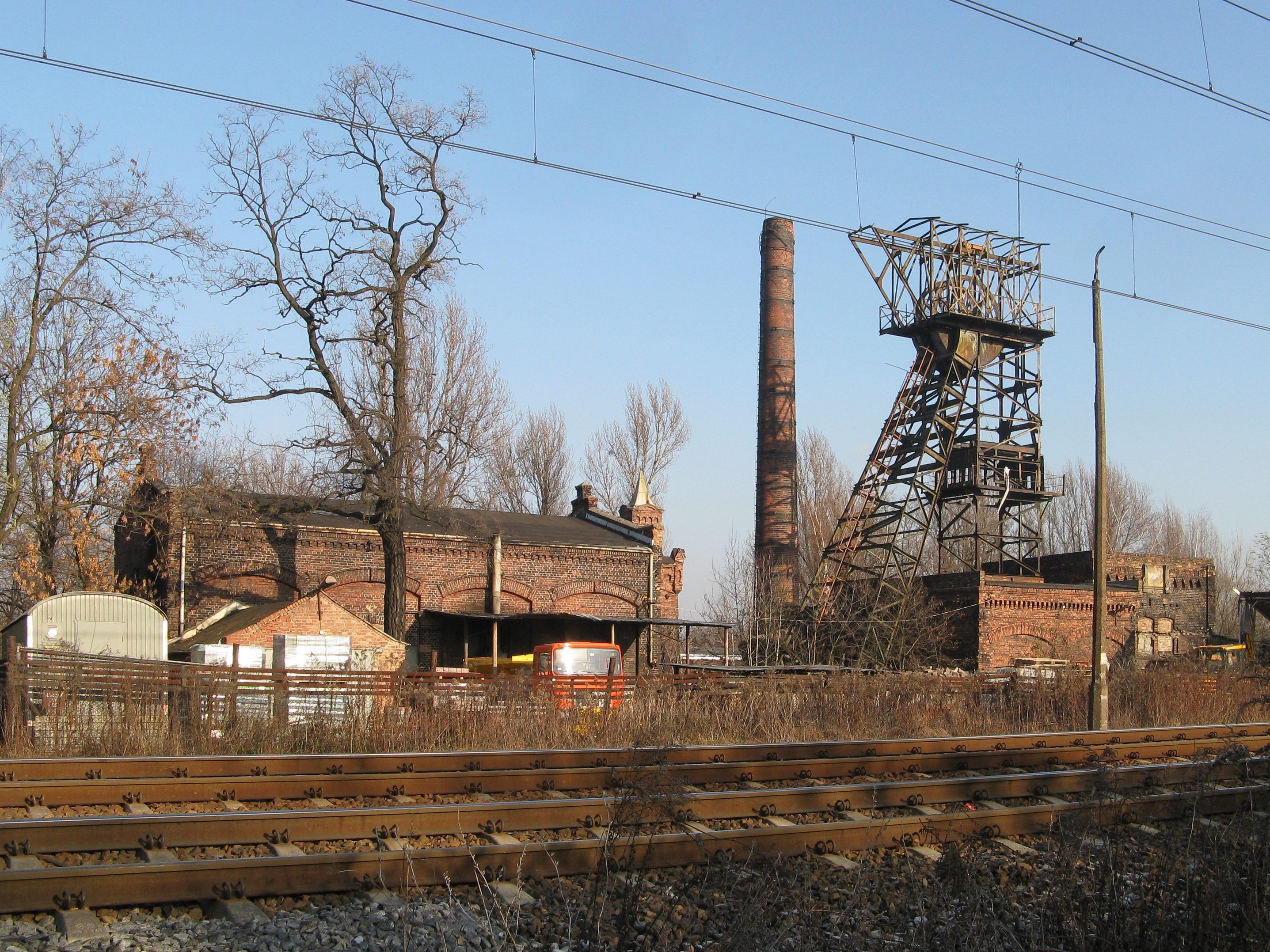 Zabudowania szybu Franciszek kopalni węgla kamiennego Walenty-Wawel: budynek maszyny wyciągowej, komin, nadszybie z wieżą wyciągową, w tle wieża remizy strażackiej.